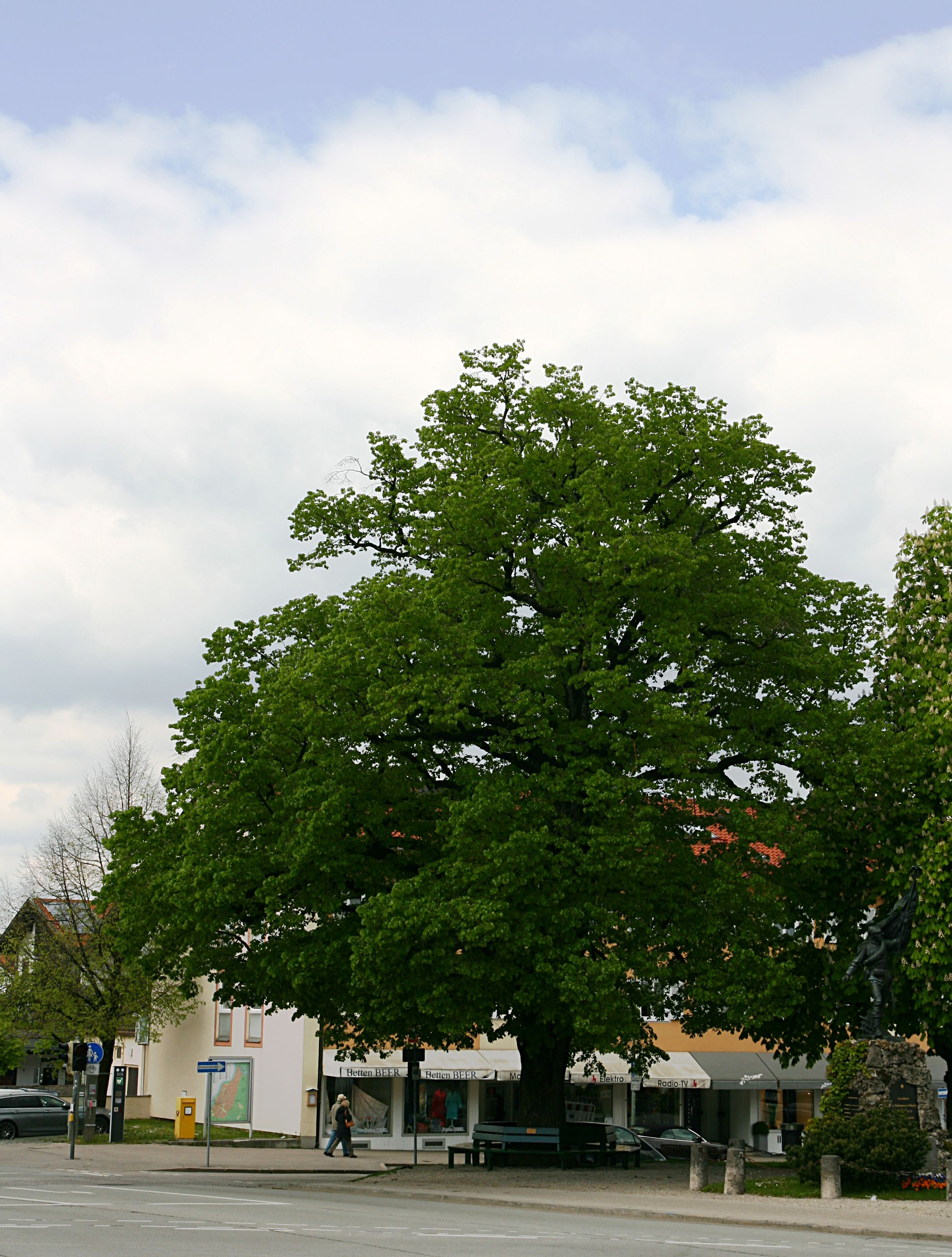 Die Verfassungslinde in Grünwald (Oberbayern) ist sowohl ein Naturdenkmal als auch ein Baudenkmal. Unten rechts im Bild das Kriegerdenkmal am Markplatz.